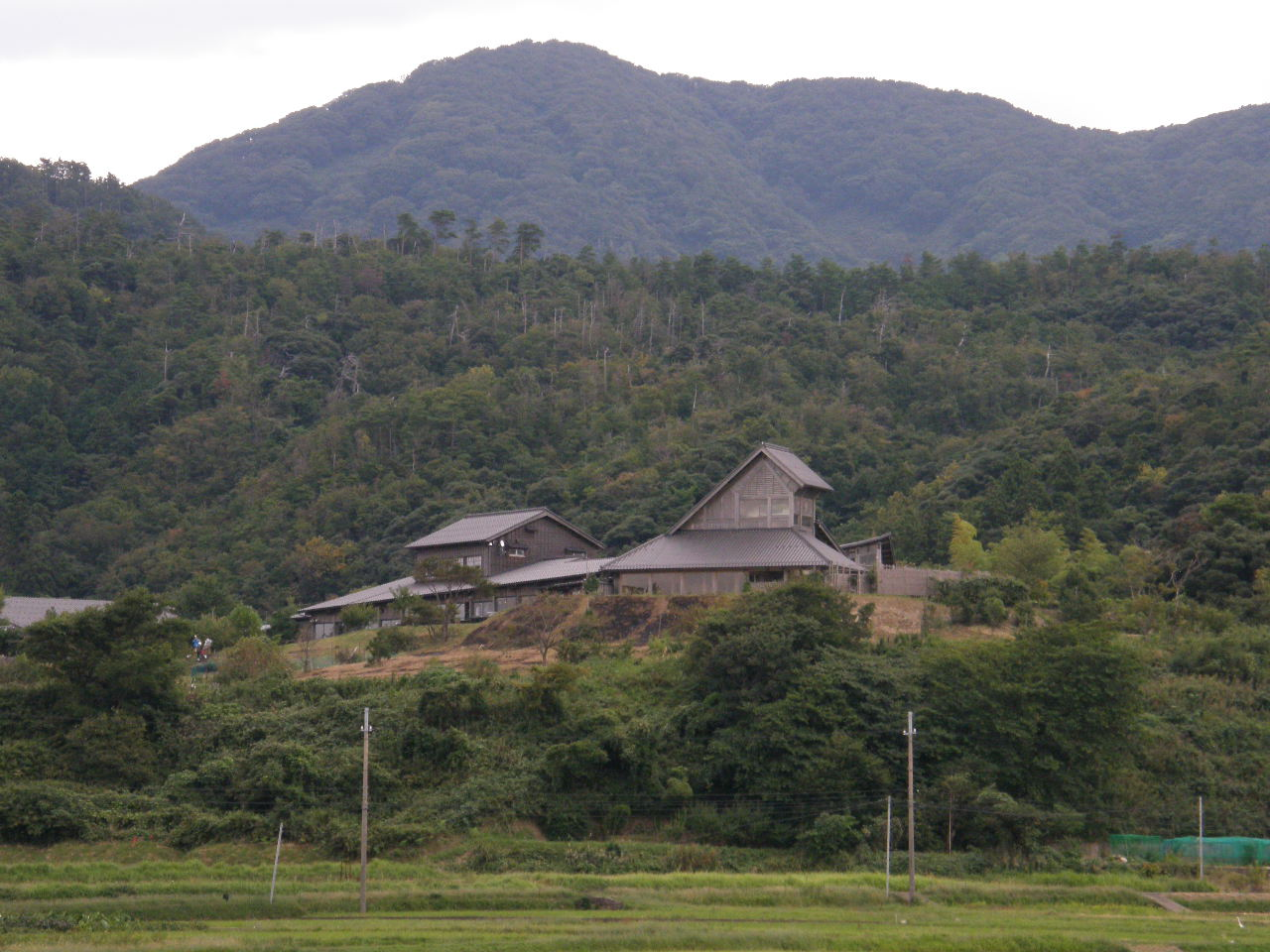 Ukawa Onsen,Tango peninsula 宇川温泉